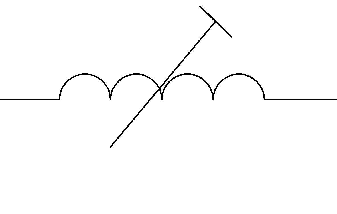 Seadepool